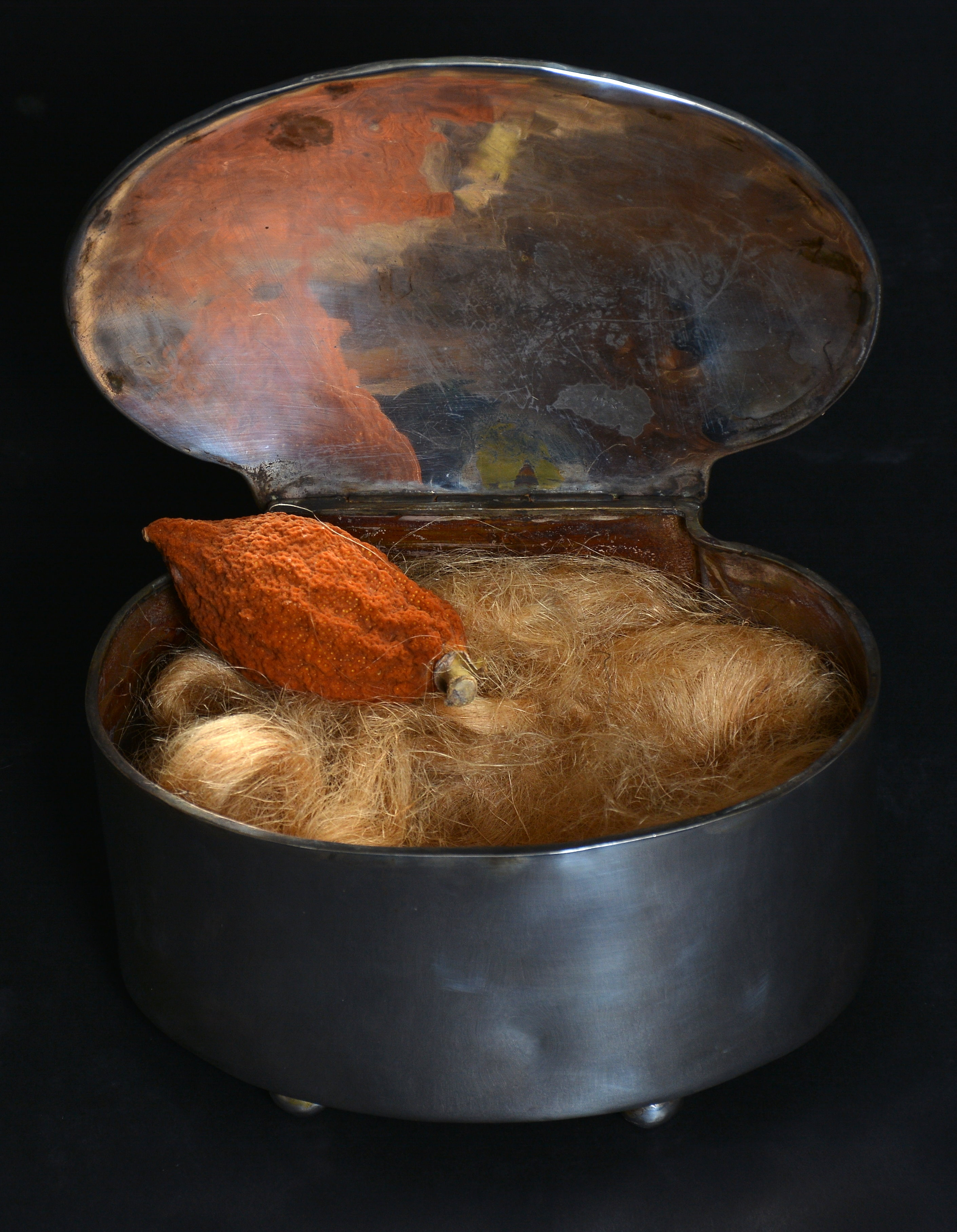 ייִדיש: א קינסטלעריש־אויסגעארבעטע זילבער-פושקע פארן אתרוג, געשאַפֿן דורך רבי חיים-יוסף-מאיר עלעפאנט